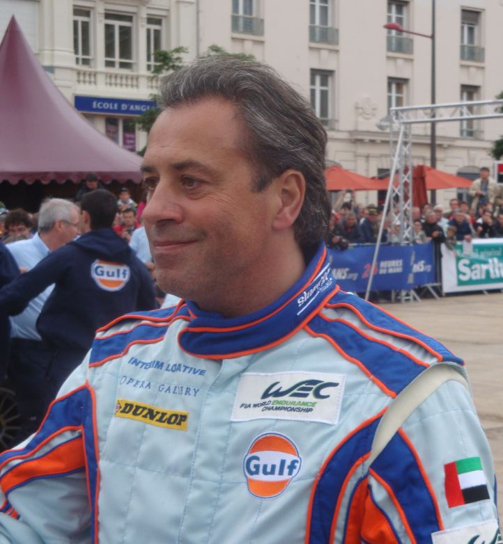 Jean-Denis Délétraz au 24H du Mans 2012